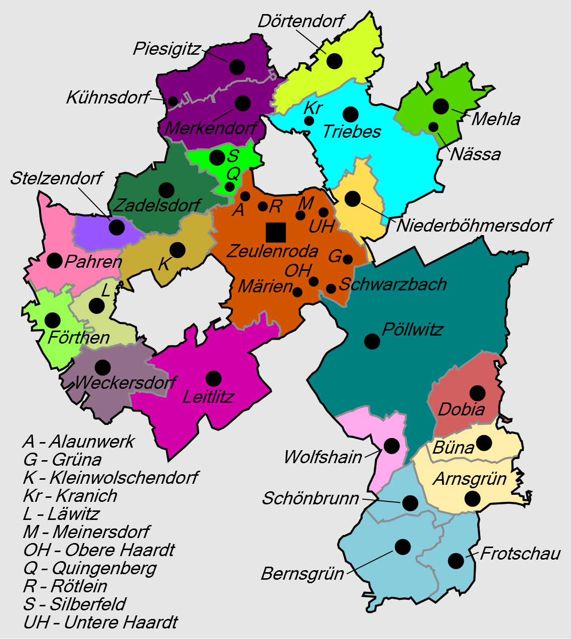 Gliederung der Stadt Zeulenroda-Triebes ab 1. Januar 1970